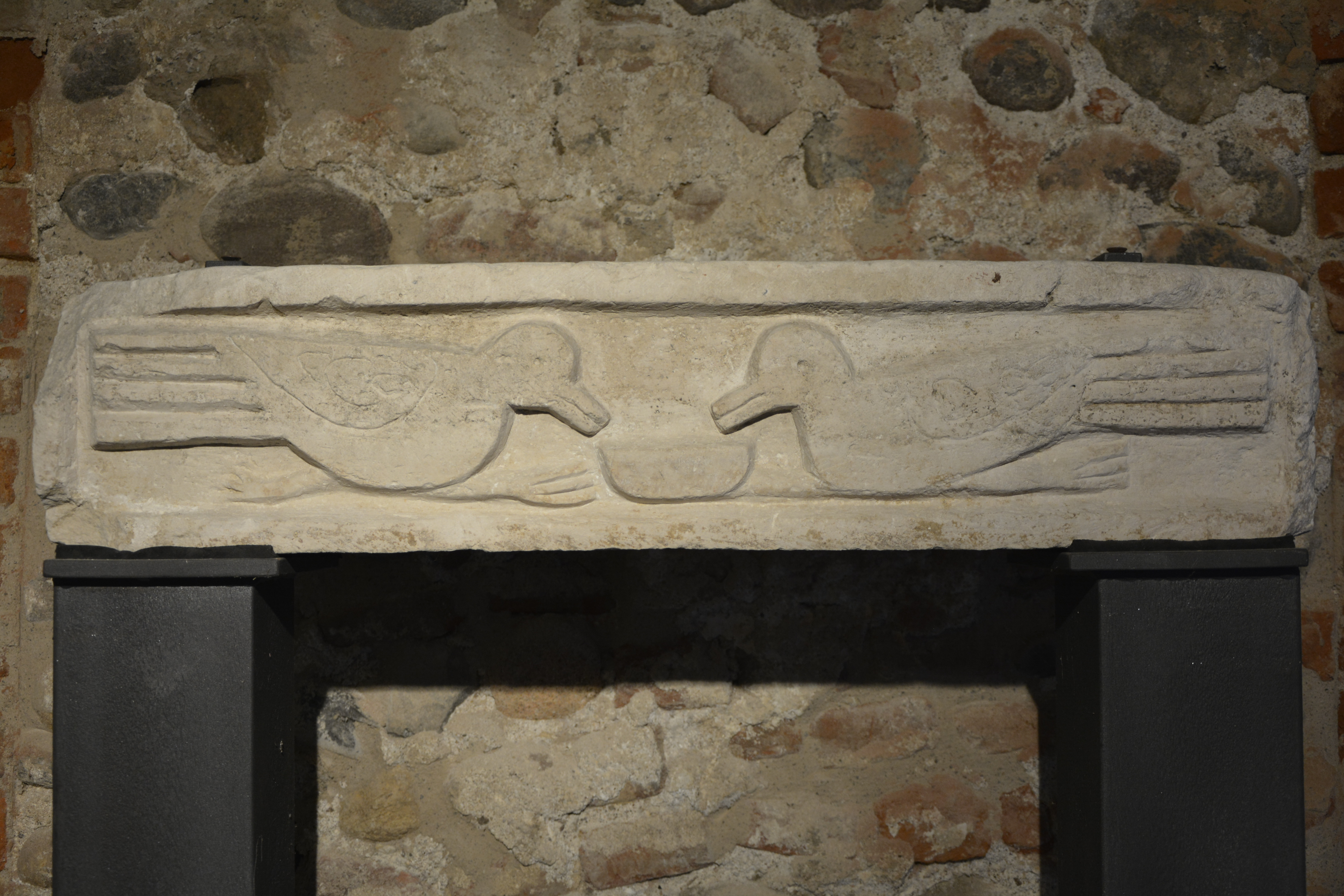 Una cornice con due colombe che si abbeverano conservata presso il monastero di Cairate, in provincia di Varese.